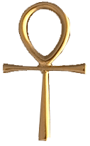 Det klassiske ANKH symbol. Opfattes normalt som et frugtbarhedssymbol i klassisk Egyptisk forståelse.